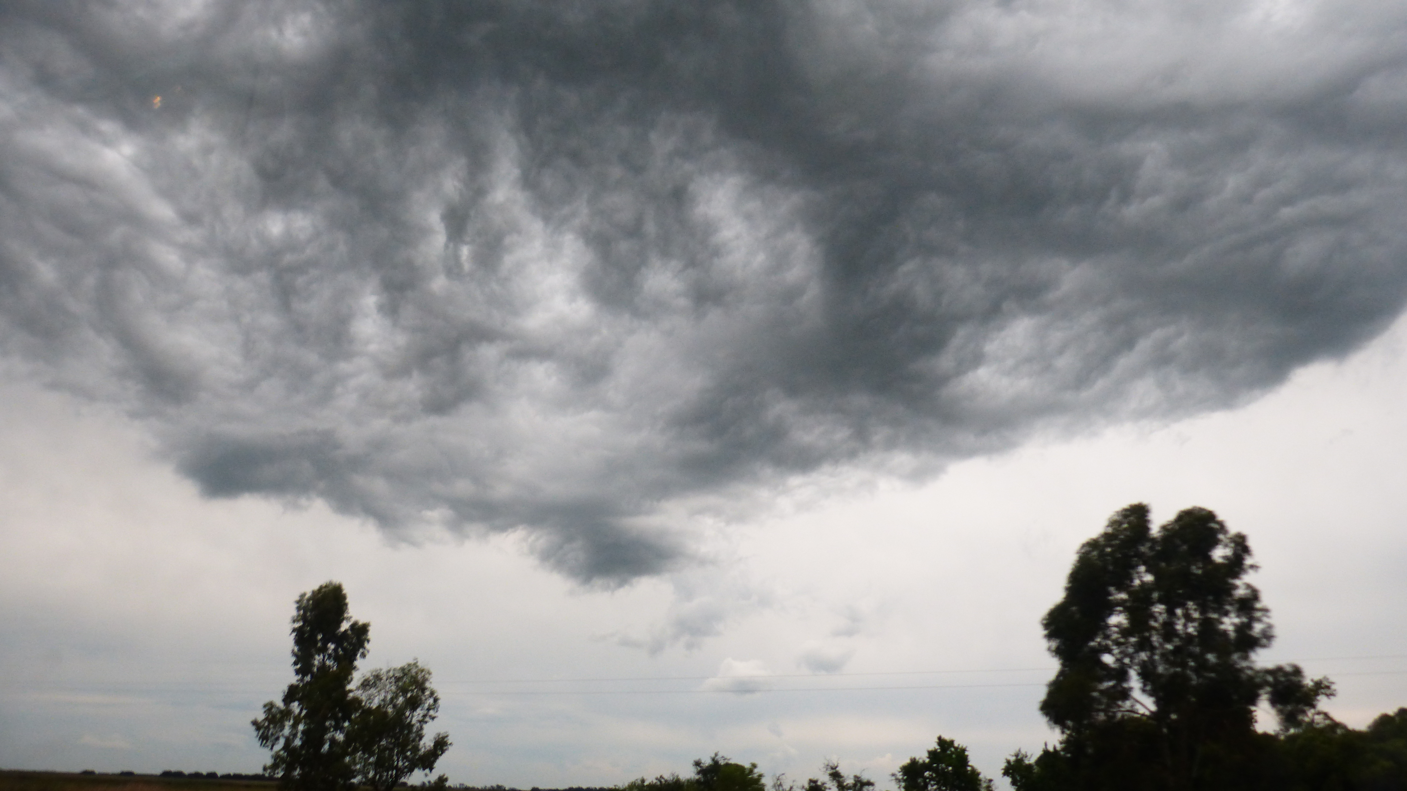 tormenta nubes preparándose en Argentina